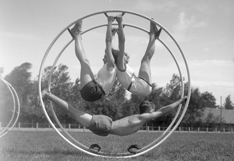 Gymnastische Uebungen am Rhönrad! Mitglieder der Hochschule für Leibesübungen bei gymnastischen Uebungen am Rhönrad, welche den Körper gelenkig und geschmeidig erhalten.